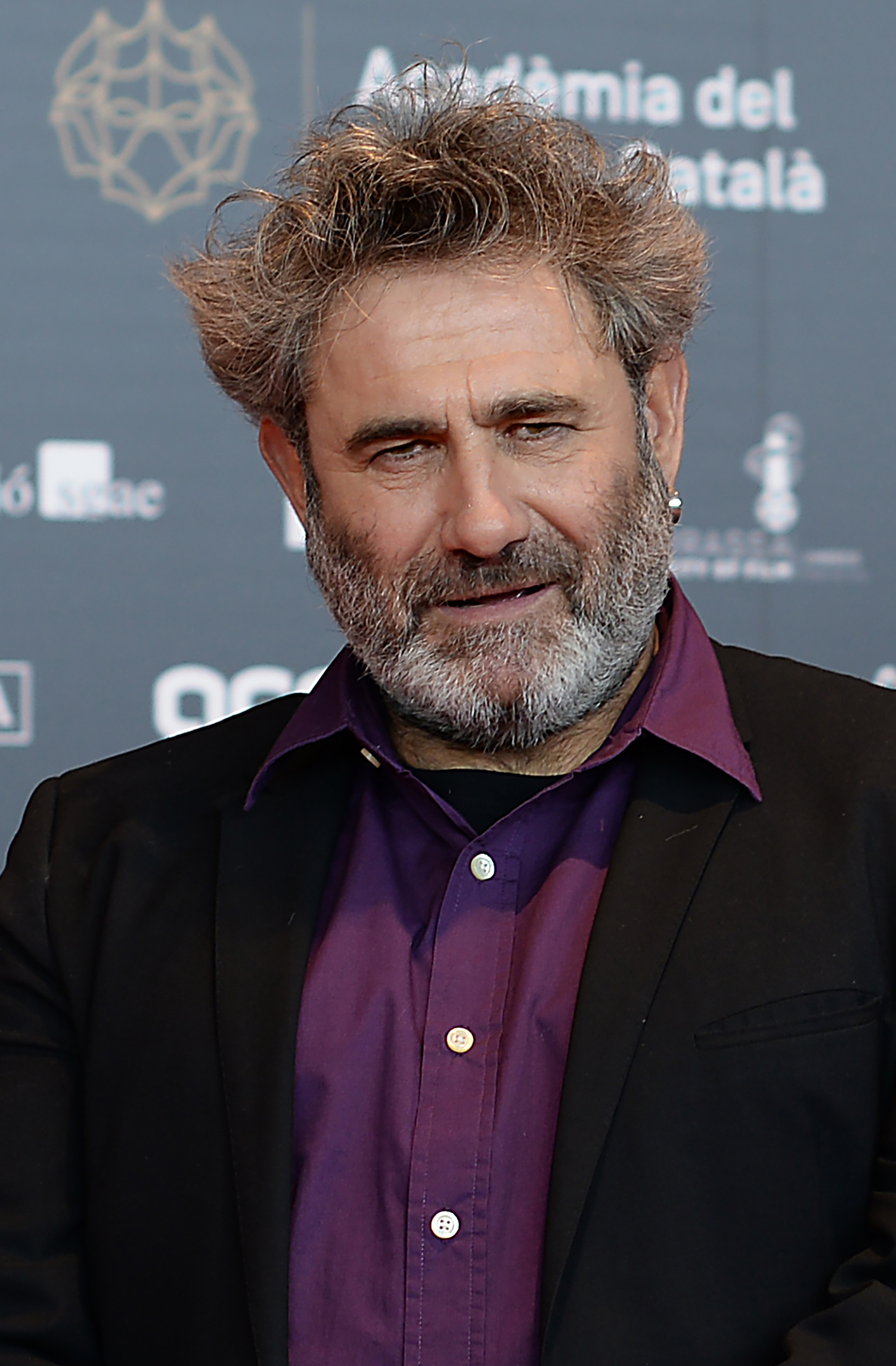 Sergi López, actor, XII Premis Gaudí (2020)